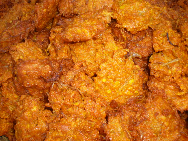 piyaju from Chokbajar, dhaka.